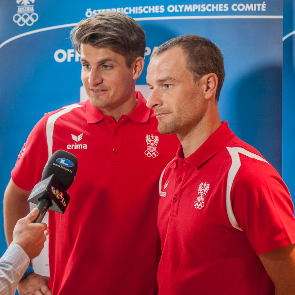 Einkleidung der Österreichischen Teilnehmer an den Olympischen Sommerspielen 2016 am 16./17. Juli 2016 in Wien. Bild zeigt Nikolaus Resch und Nico Delle-Karth.